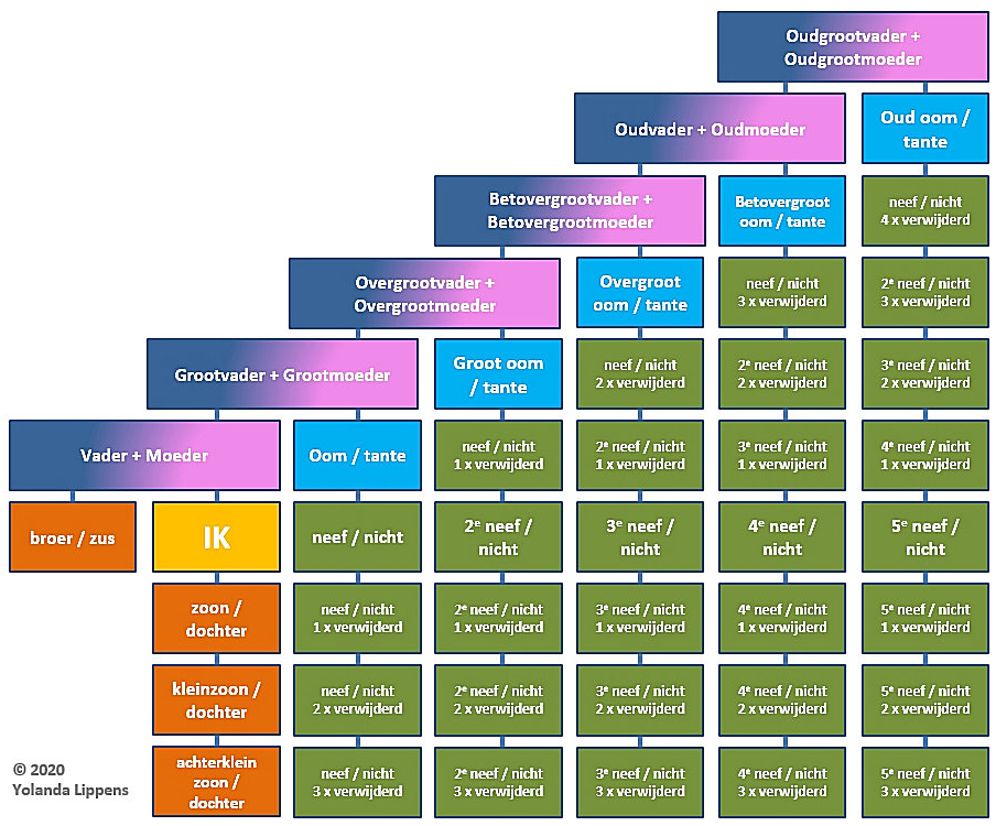 Overzicht van de internationale benaming van ooms, tantes, neven en nichten in het Nederlands